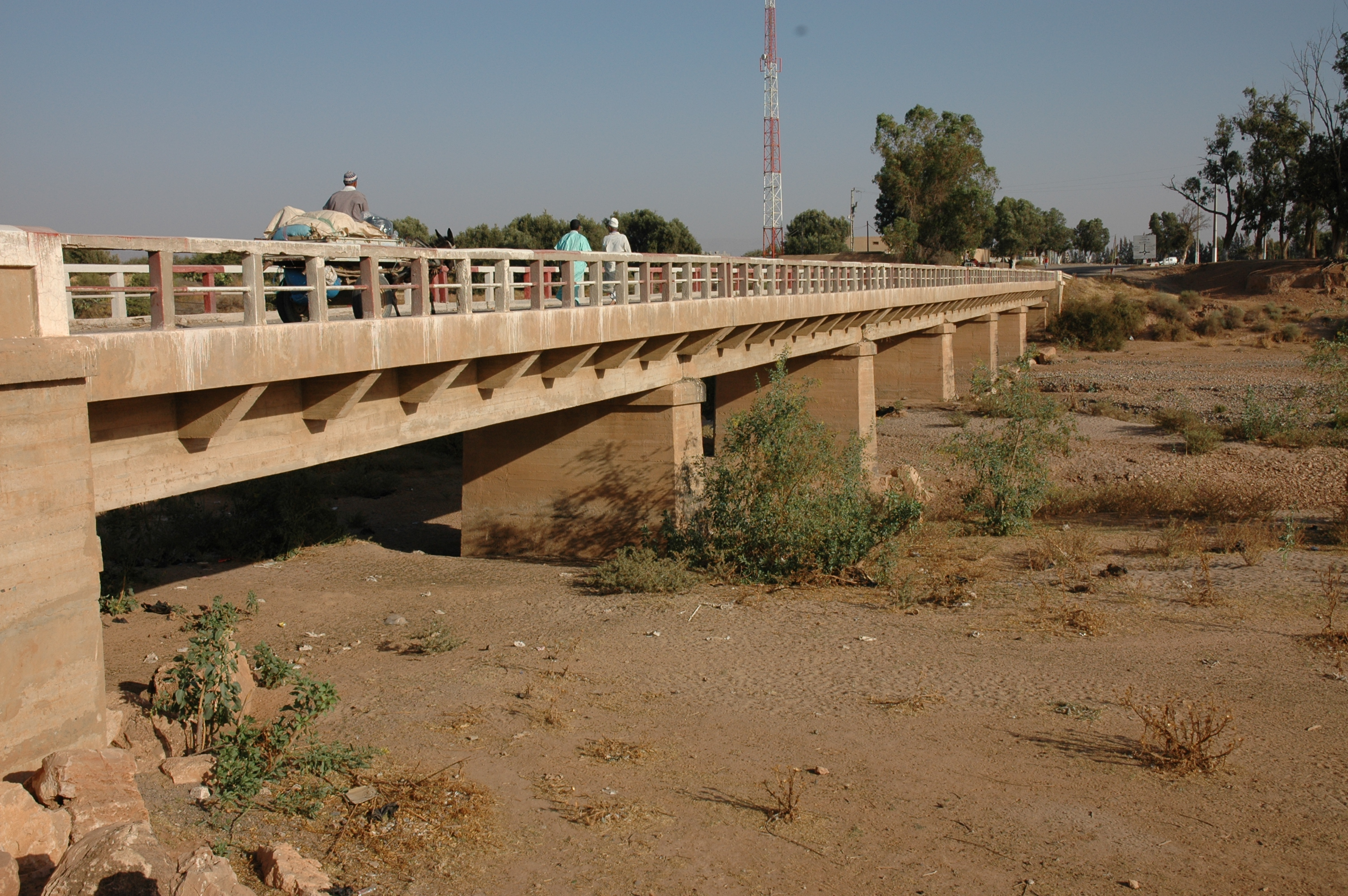 Pont sur l'Oued Souss (Maroc).